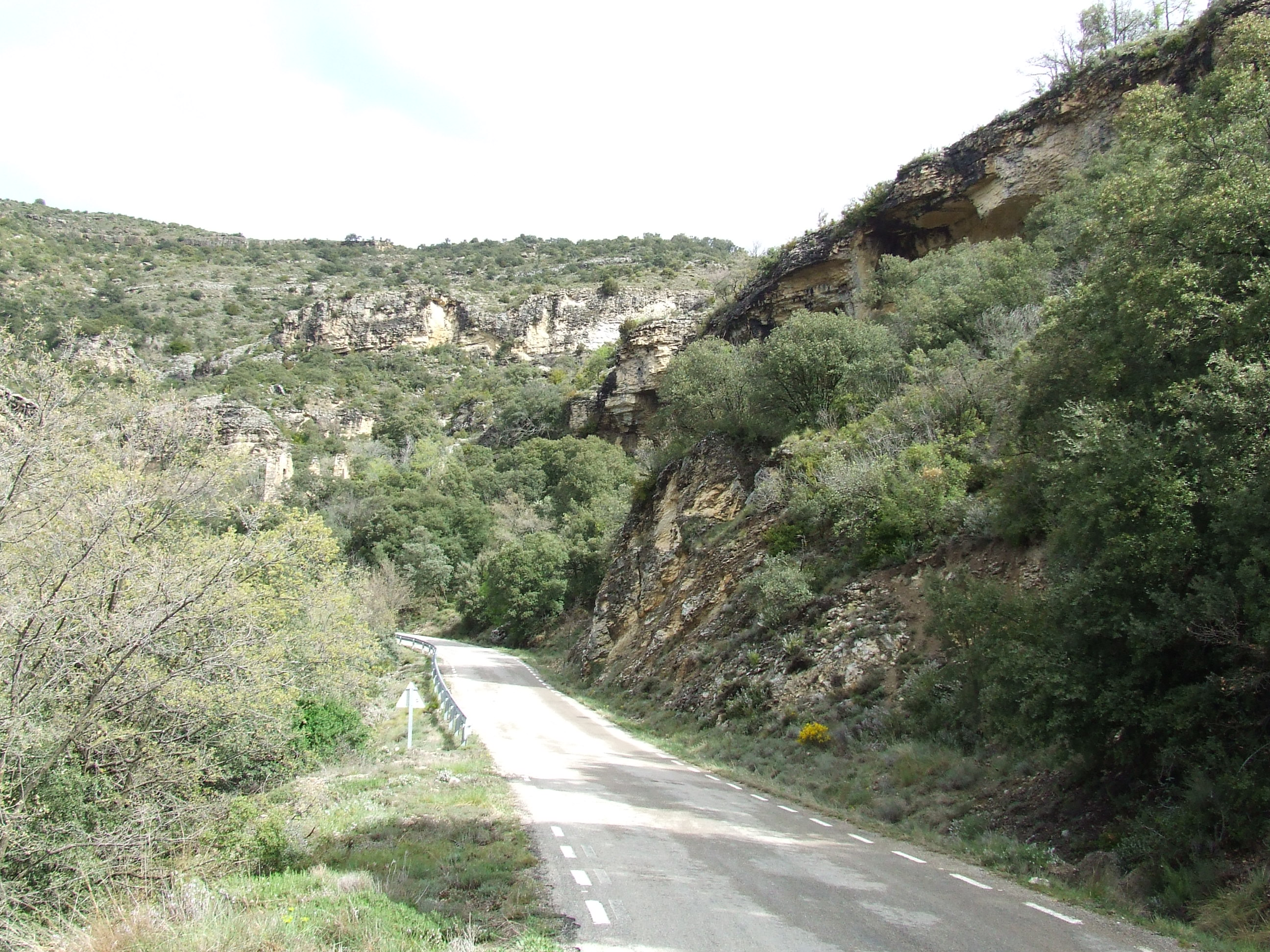 Restes d'una de les cases de les Esplugues (Mur, Castell de Mur, Pallars Jussà)